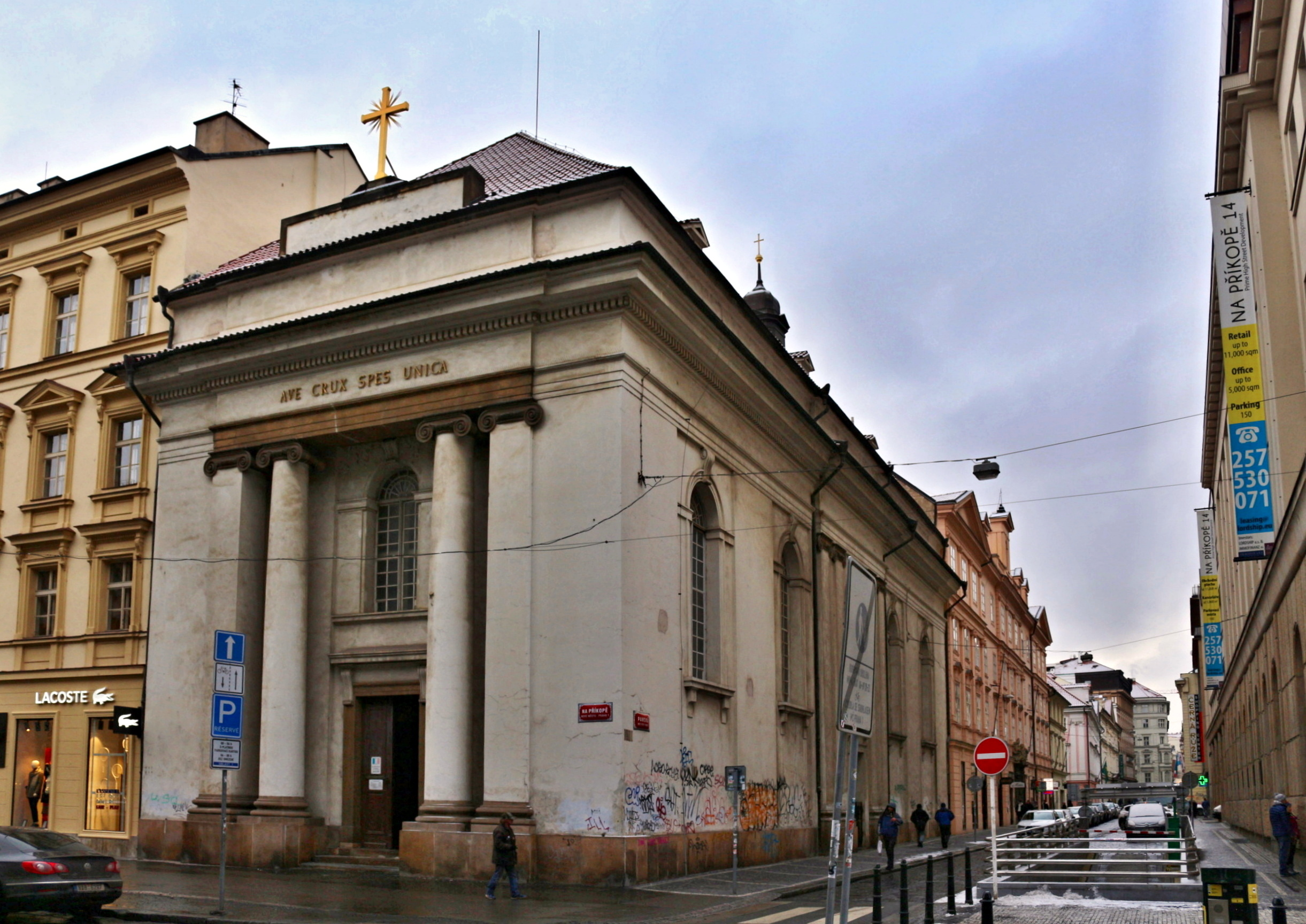 Kostel sv. Kříže